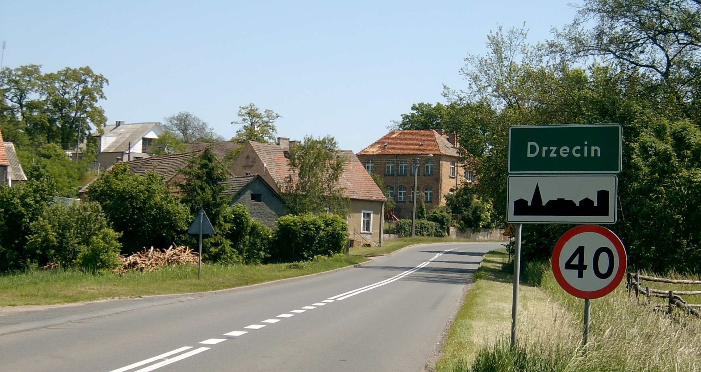 Drzecin